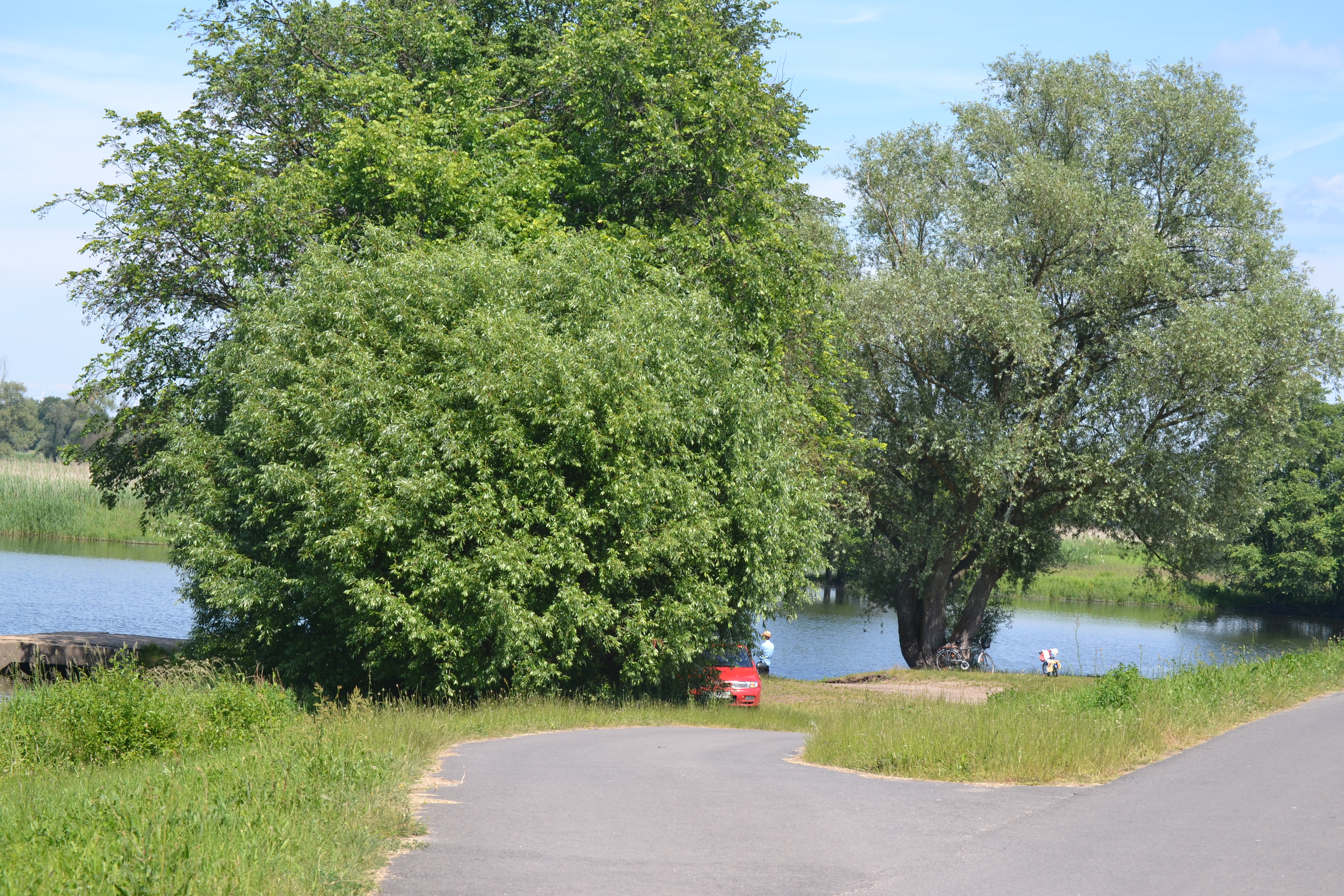 Badestelle am Oderarm in Kienitz/Letschin am Oder-Neiße-Radweg; Teil des LSG „Odervorland Groß Neuendorf-Lebus“, des FFH-Gebietes „Oderaue Kienitz“ sowie des Vogelschutzgebietes „Mittlere Oderniederung“.